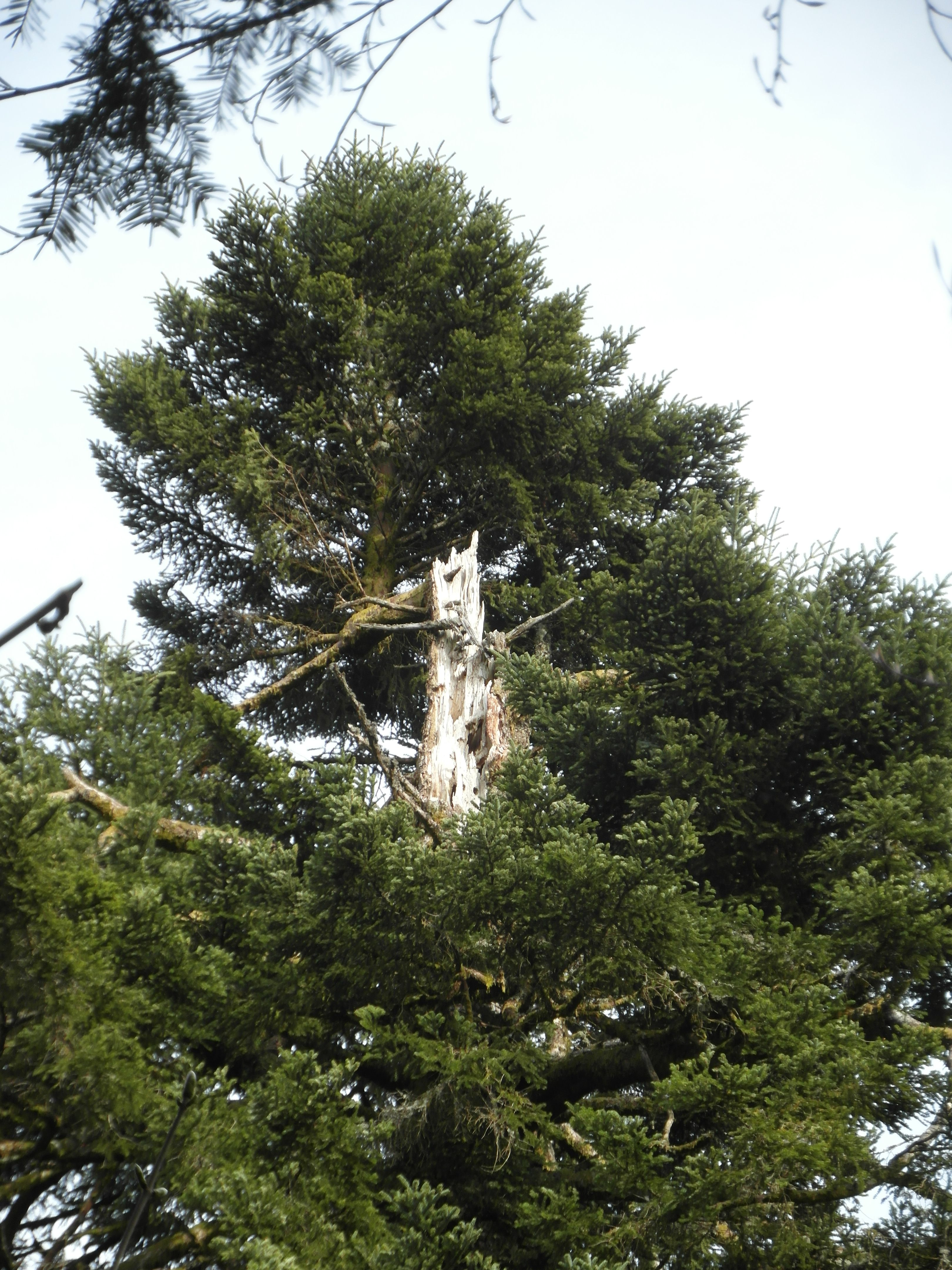 Stammverletzung- Abbruch des Stammes